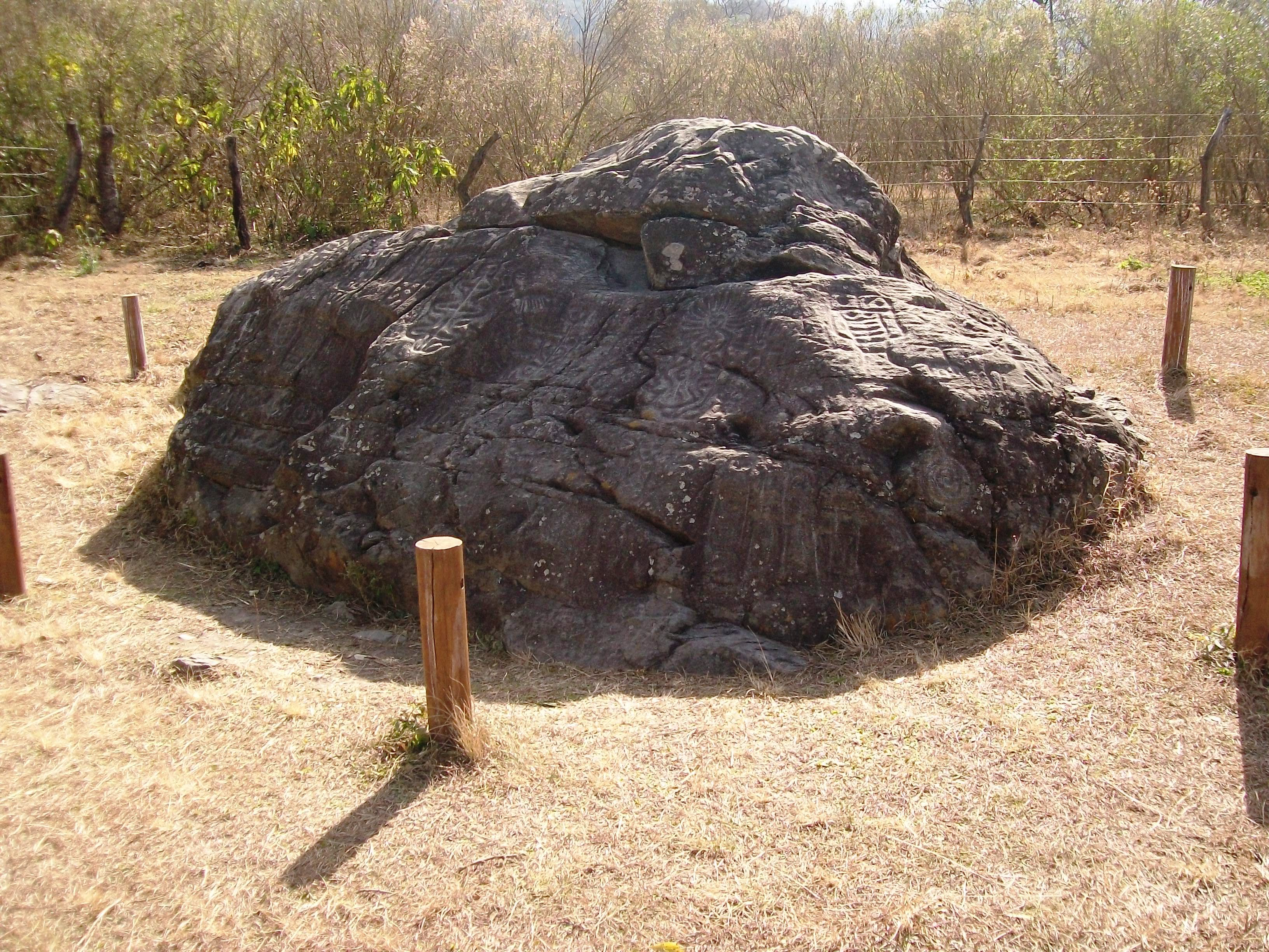 Piedra Pintada, San Pedro de Colalao, Tucumán, Argentina